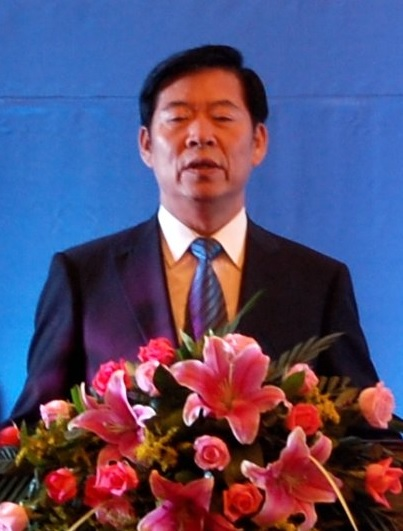 杨栋梁，曾任天津市常务副市长、国家安全生产监督管理总局局长，后被判处有期徒刑15年。